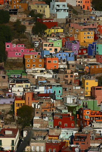 Vidaĵo de la urbo Guanajuato, Meksiko